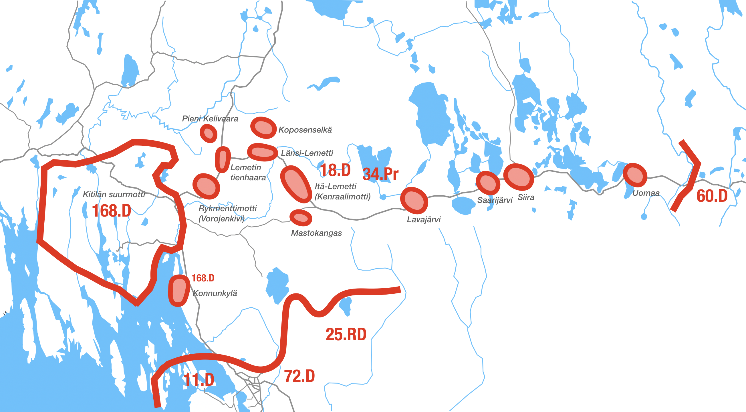 Suomen ja Neuvostoliiton välisessä Talvisodassa Laatokan pohjoispuolella suomalaisten saarrostavan vastahyökkäyksen seurauksena Neuvostoliittolaiset 18. ja 168. jalkaväkidivisioona ja 34. panssariprikaati jäivät saarroksiin Kitilän suurmottiin ja lukuisiin pienempiin motteihin. Suomalaiset tuhosivat lähes kaikki pienemmät motit. Neuvostojoukkojen tappiot olivat koko talvisodan raskaimmat.